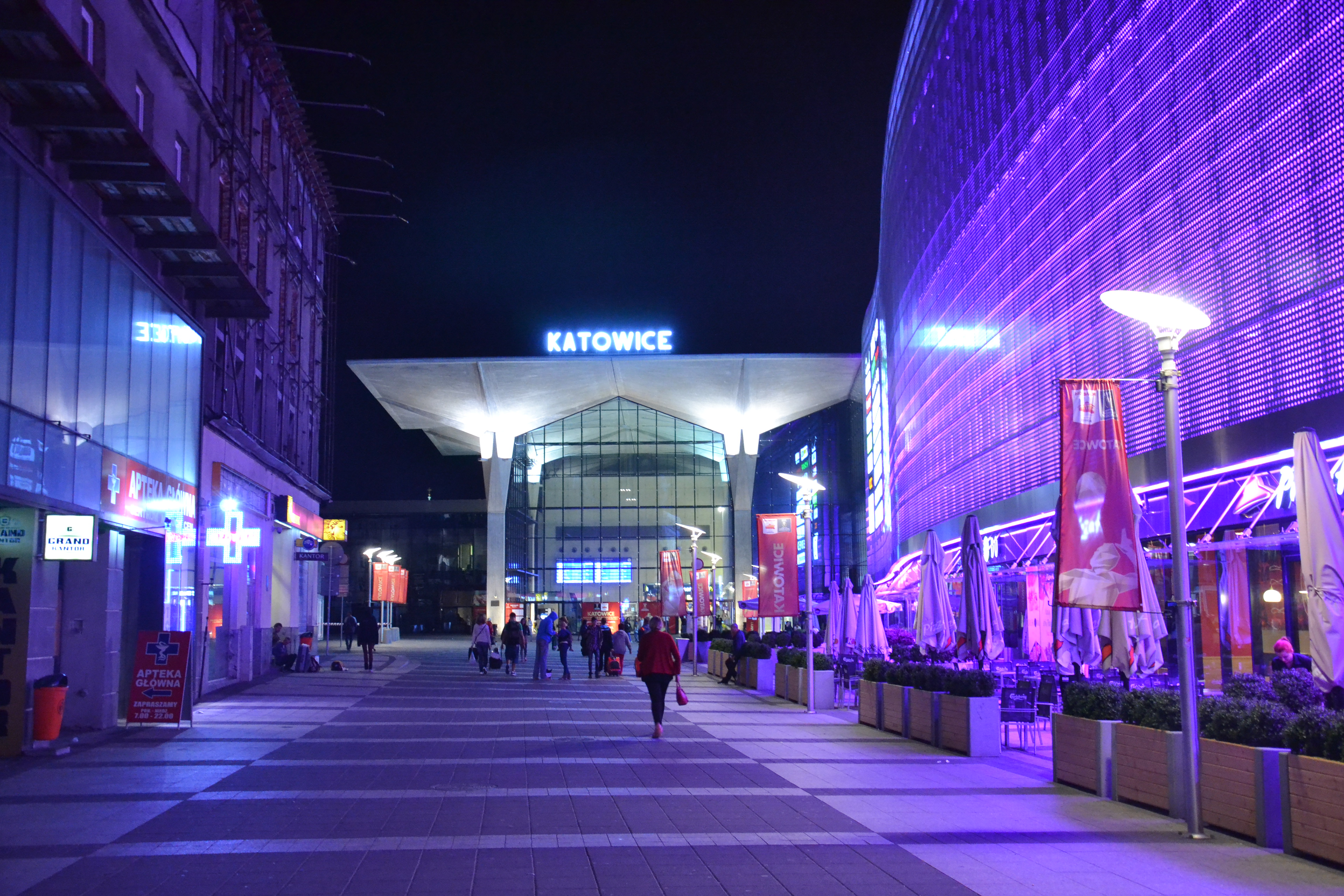 Widok nocą na dworzec kolejowy w Katowicach